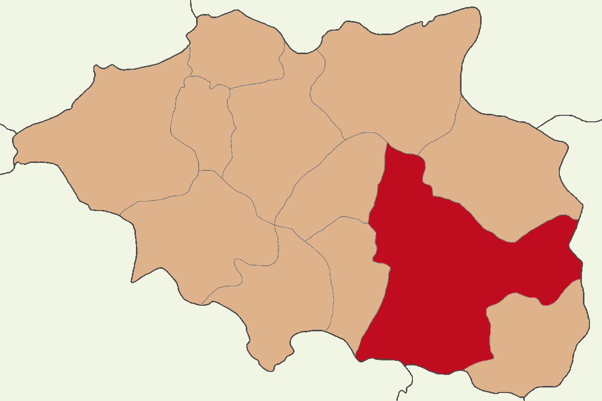 Çankırı Merkez ilçesinin konumu